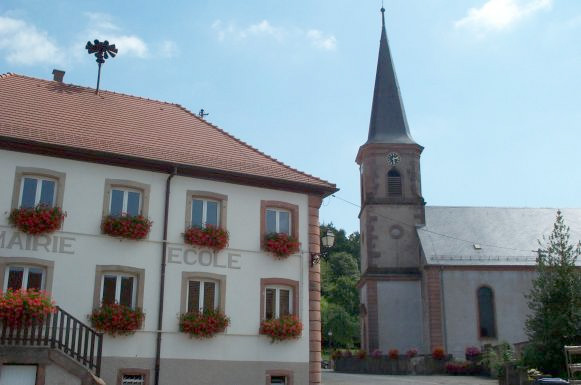 Mairie et Eglise de Colroy-la-Roche